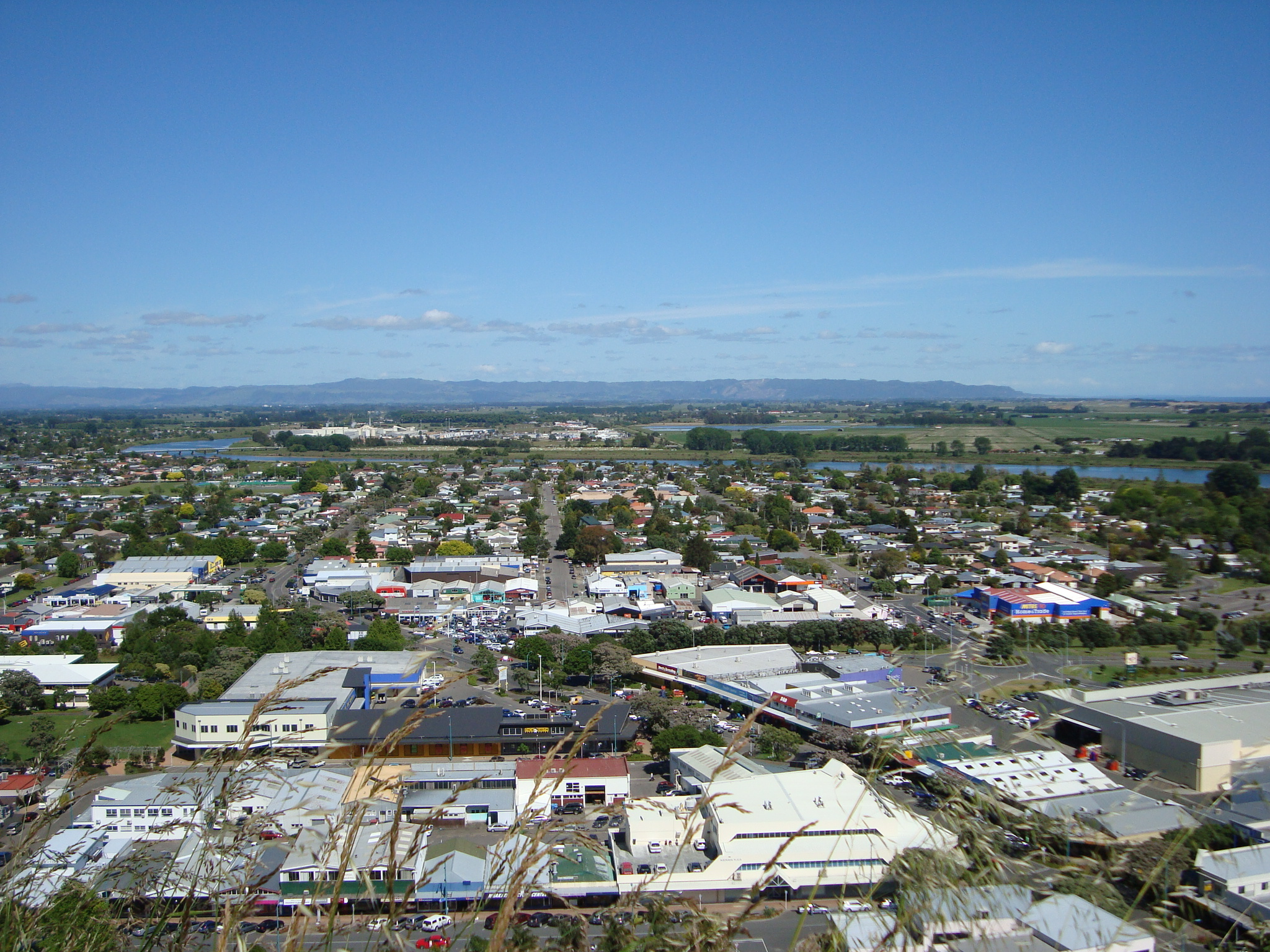 Oversikt over Whakatane by.